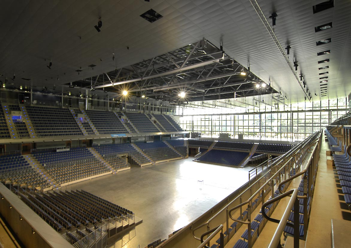 Die Arena in der Max-Schmeling-Halle Berlin ohne Publikum.